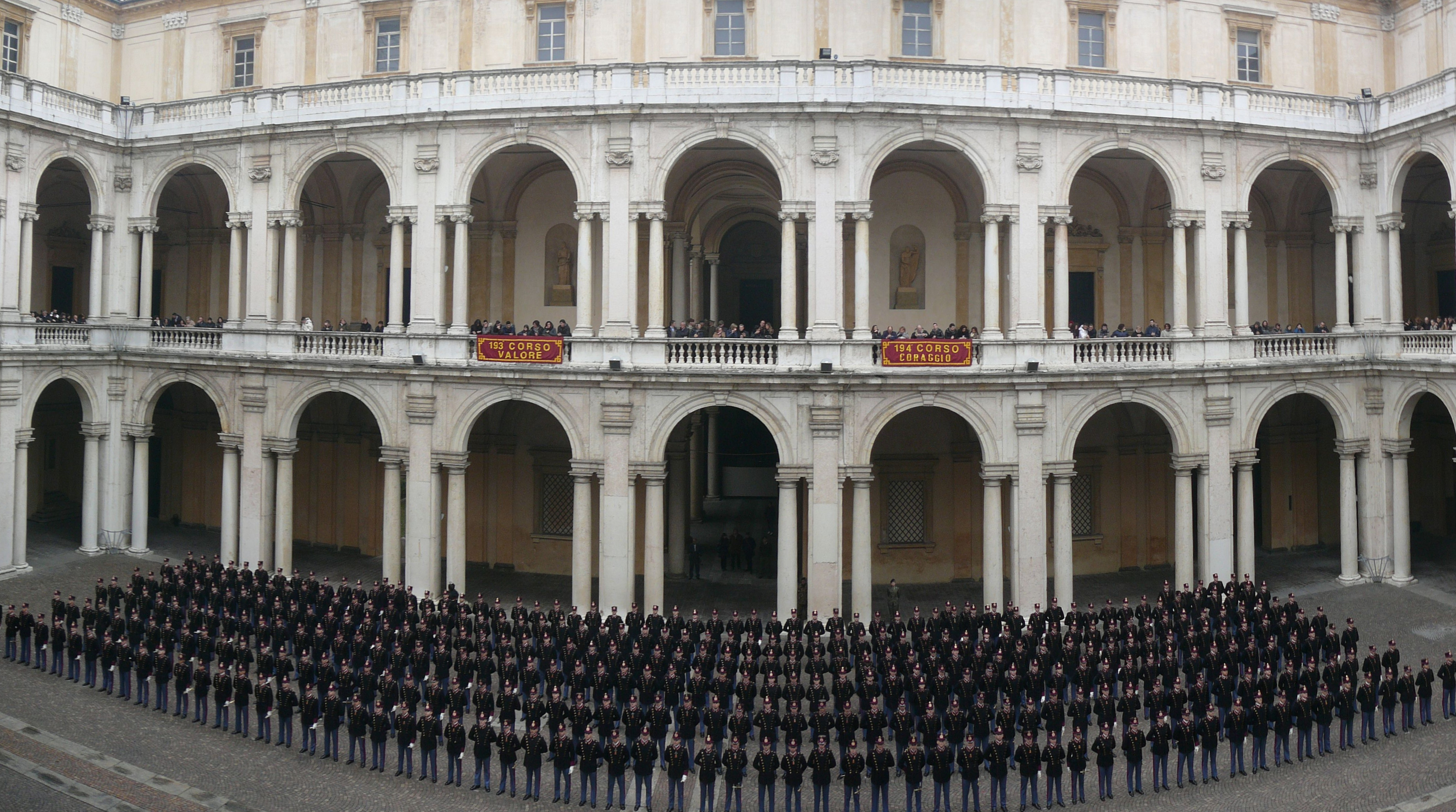 Cerimonia consegna spadino 2012 - Cadetti dispiegati